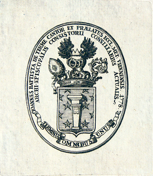 Exlibris vum Jean-Baptiste Determe, hei de Terme:Ioannes Baptista de Terme Cantor et Praelatus Eccl: Met: Viennensis 1778. Archi-Episcopalis Consistorii Consiliarius Actualis. Terminus Omnibus Unus.